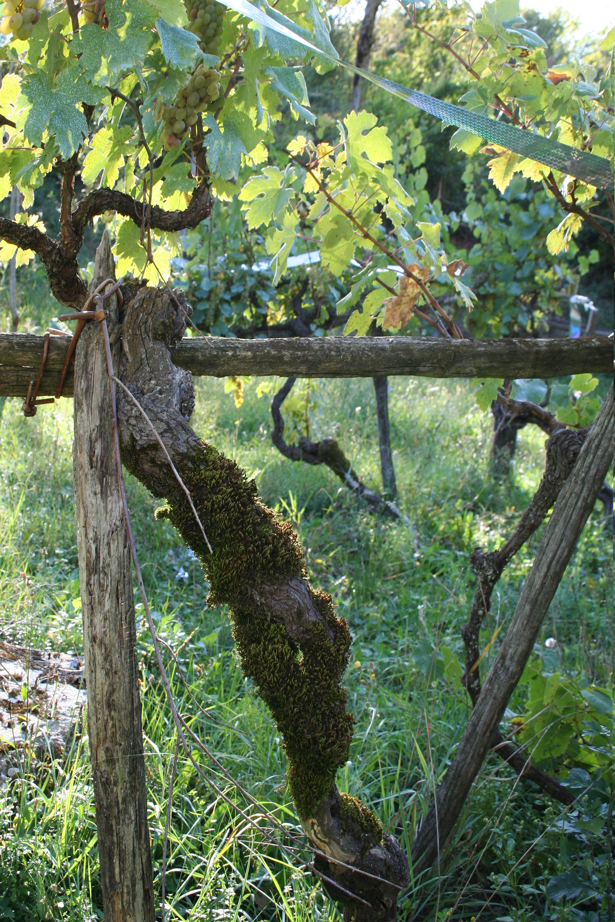 Pianta di vitigno Pecorino di Arquata del Tronto. Un sentito ringraziamento a Giacomo Eupizi che accordandomi l'accesso alla sua vigna ha consentito lo scatto di questa immagine.